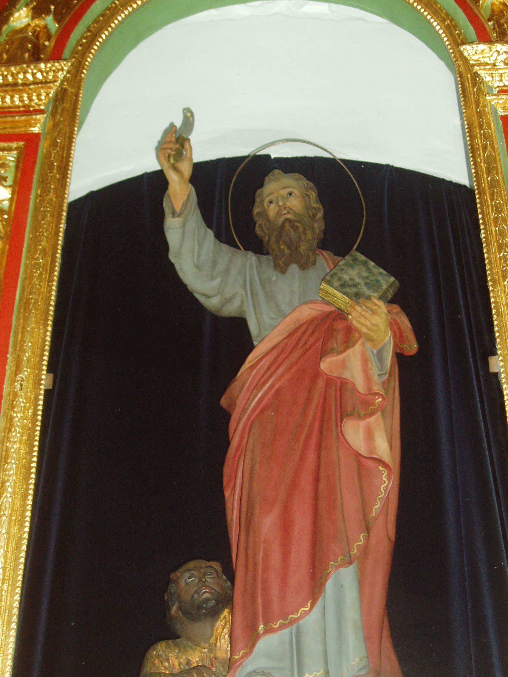 Imagen de San Bartolomé con sus atributos.